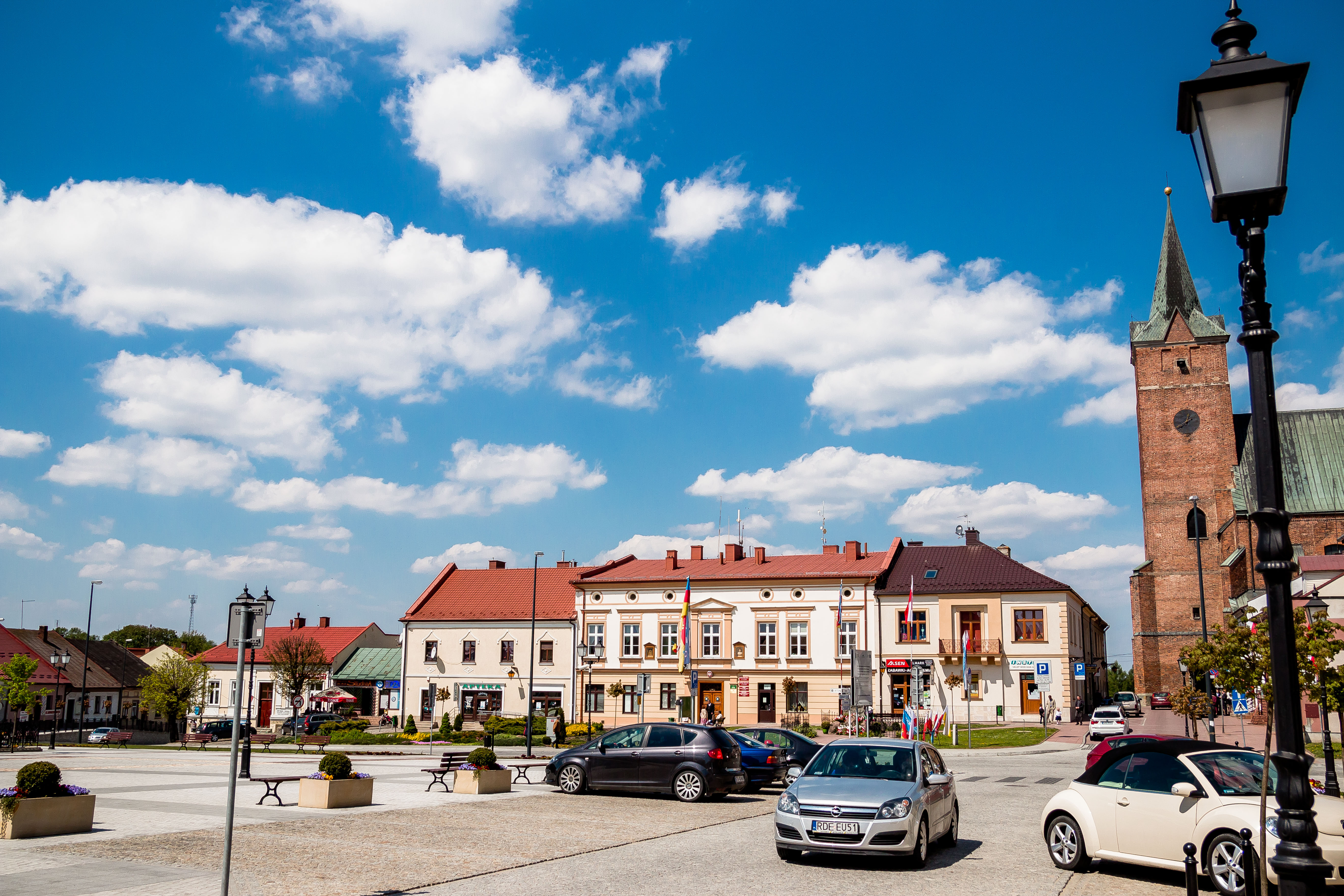 Rynek od strony północnej. Widok na kościół parafialny pw. św. Jana Chrzciciela.